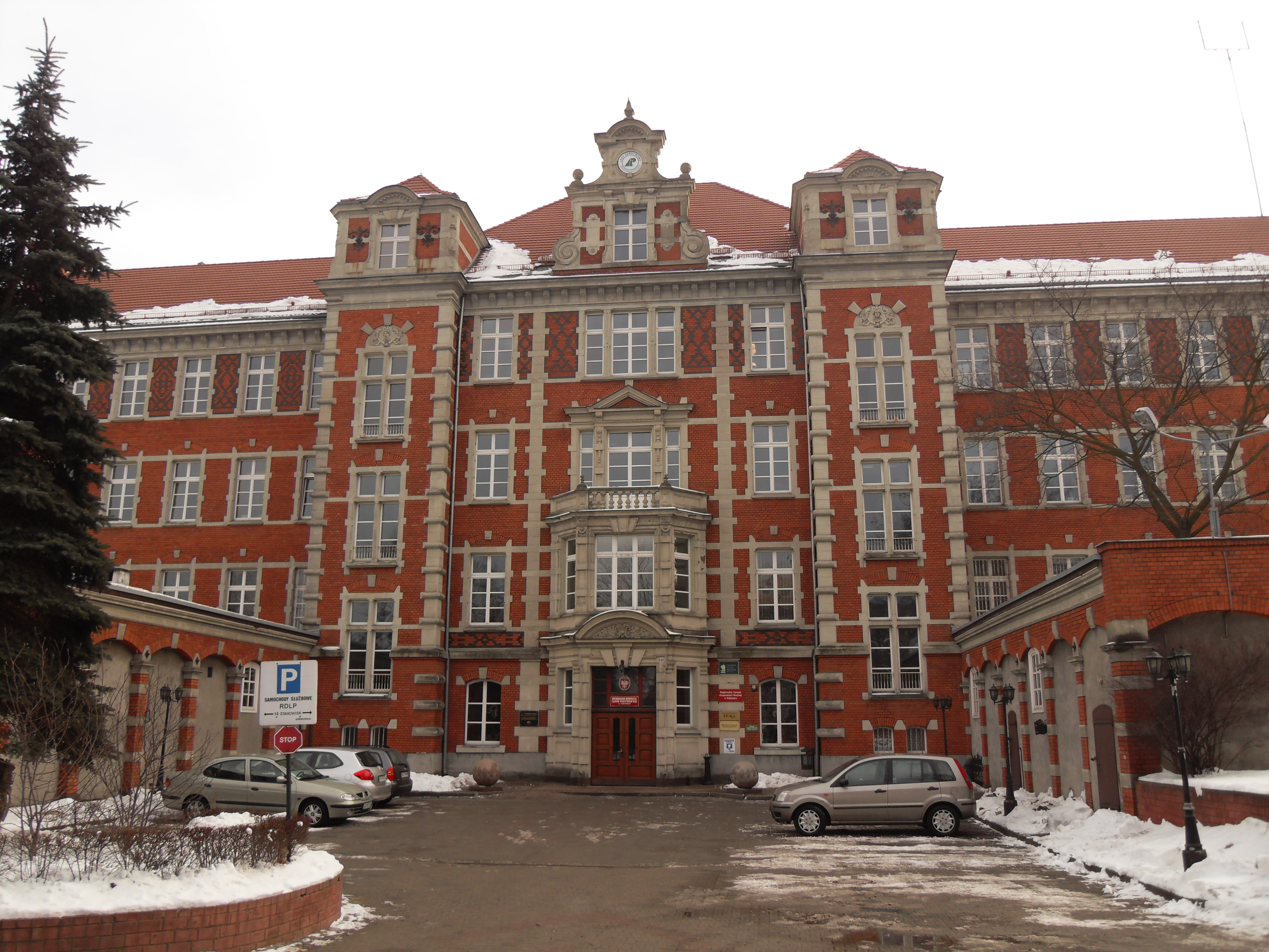 Gmach dawnego szpitala miejskiego z 1887 roku, później Städtishes Arbeitshaus, obecnie Regionalna Dyrekcja Lasów Państwowych w Gdańsku, ul. Rogaczewskiego 9/19.